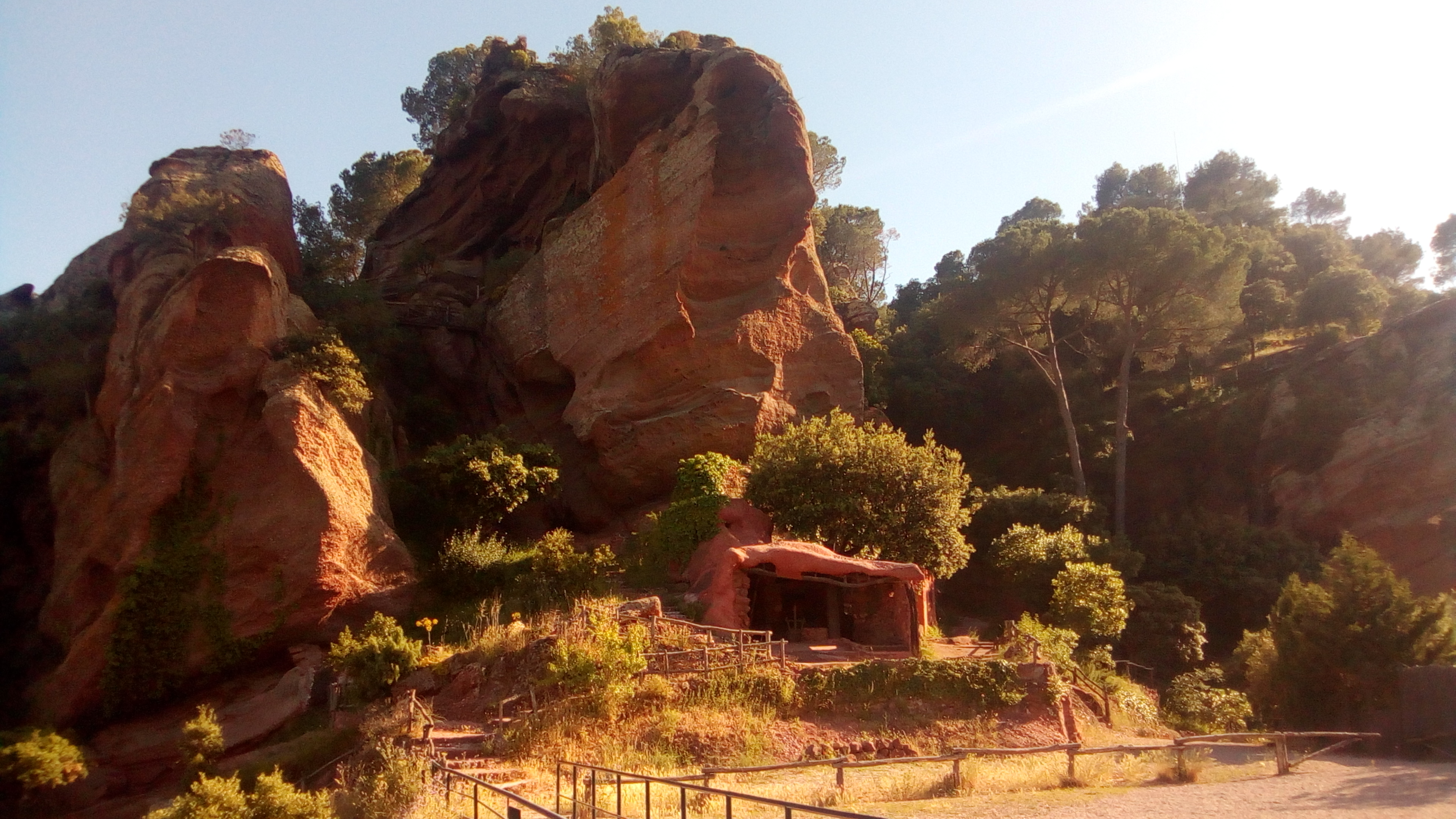 Penya del Corb, Corbera de Llobregat.